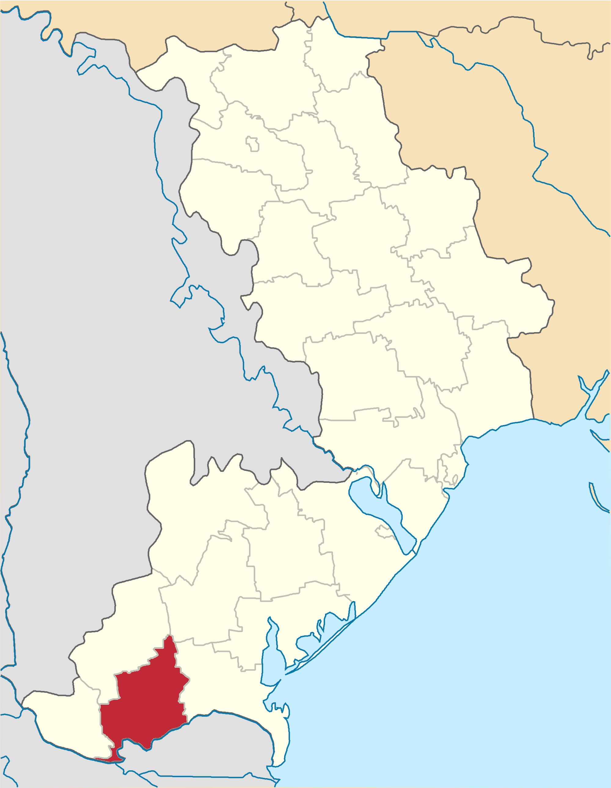 Izmayilskyi-Raion map